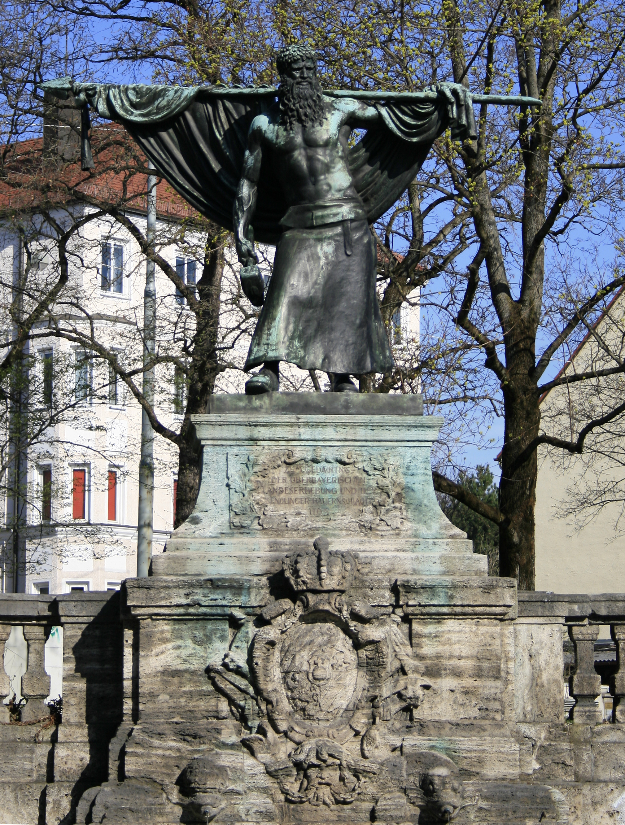 Denkmal für den Schmied von Kochel in München-Sendling, Lindwurmstraße, am Sendlinger Berg; 1905-1911 von Bildhauer Carl Ebbinghaus und Architekt Carl Sattler